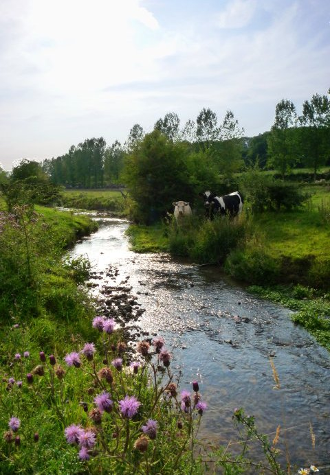 La Créquoise à Torcy en Artois.